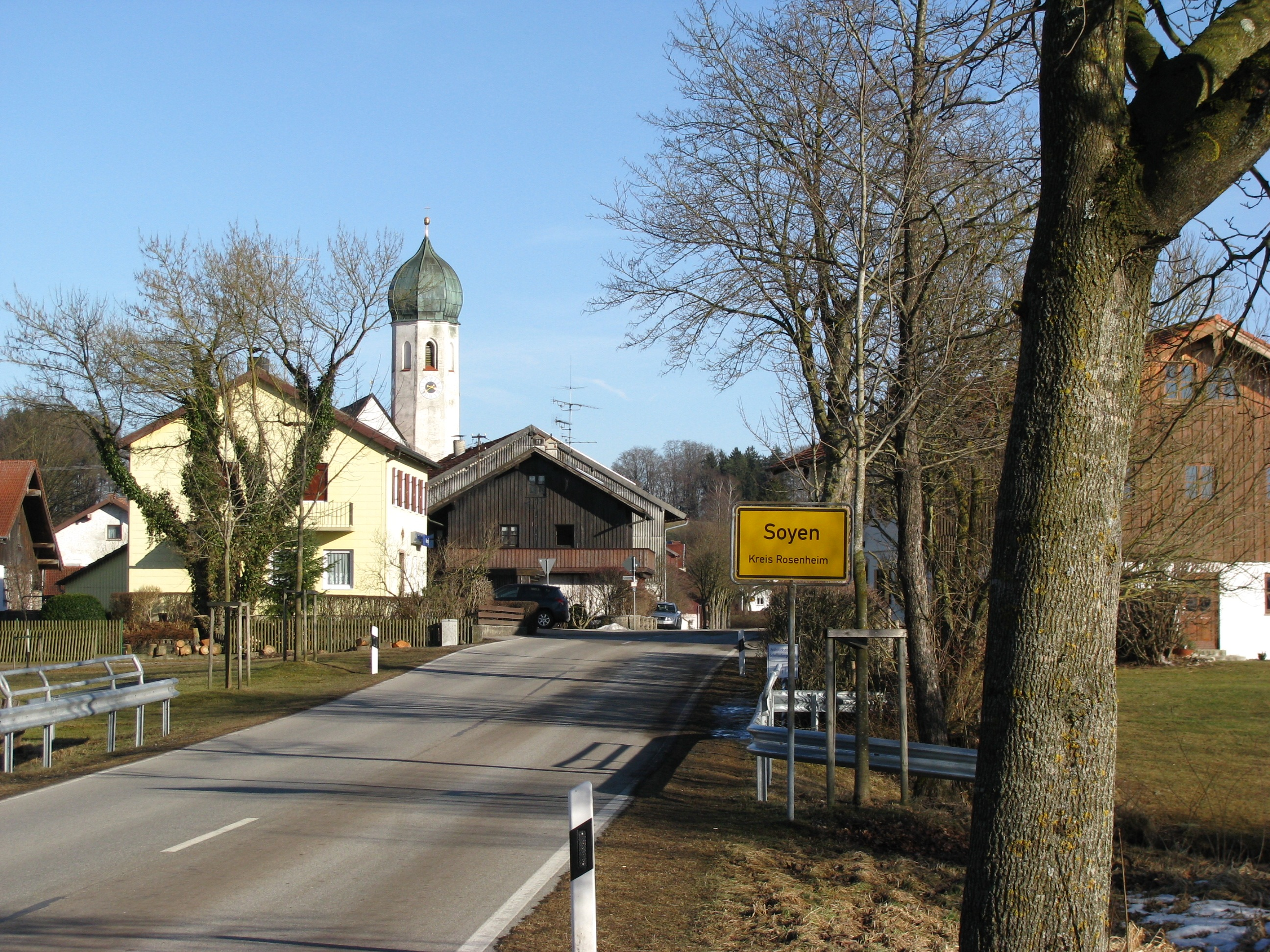 Westliche Ortseinfahrt von Soyen im Landkreis Rosenheim (Kreisstraße RO 40)